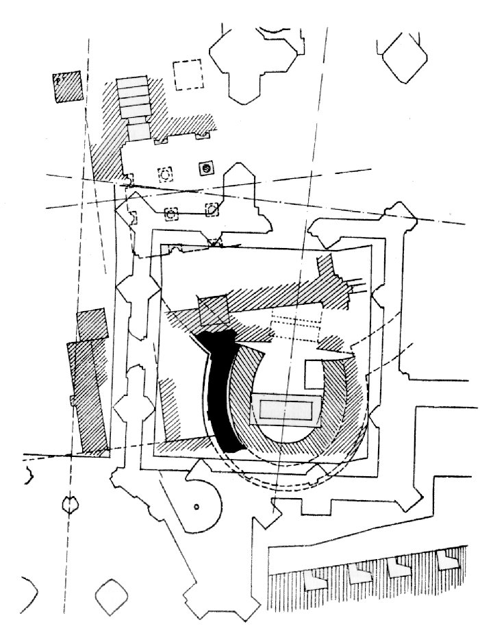 Na následujícím obrázku je zachycen stav jižní apsidy. Do obrázku je dokreslen i členitý půdorys svatováclavské kaple Karlovy gotické katedrály; zachycen i světcův hrob